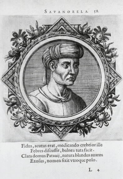 Michele Savonarola